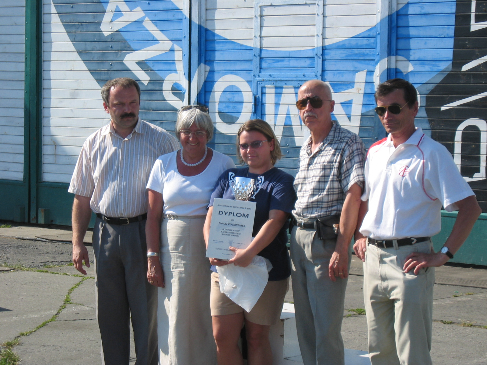 Spadochronowe Mistrzostwa Śląska 2006. Dyplom dla Danuty Polewskiej za sportową postawę. Od prawej: Jan Isielenis, Marian Brytan. Pierwszy z lewej Krzysztof Piekarczyk - Sekcja Spadochronowa Aeroklubu Gliwickiego